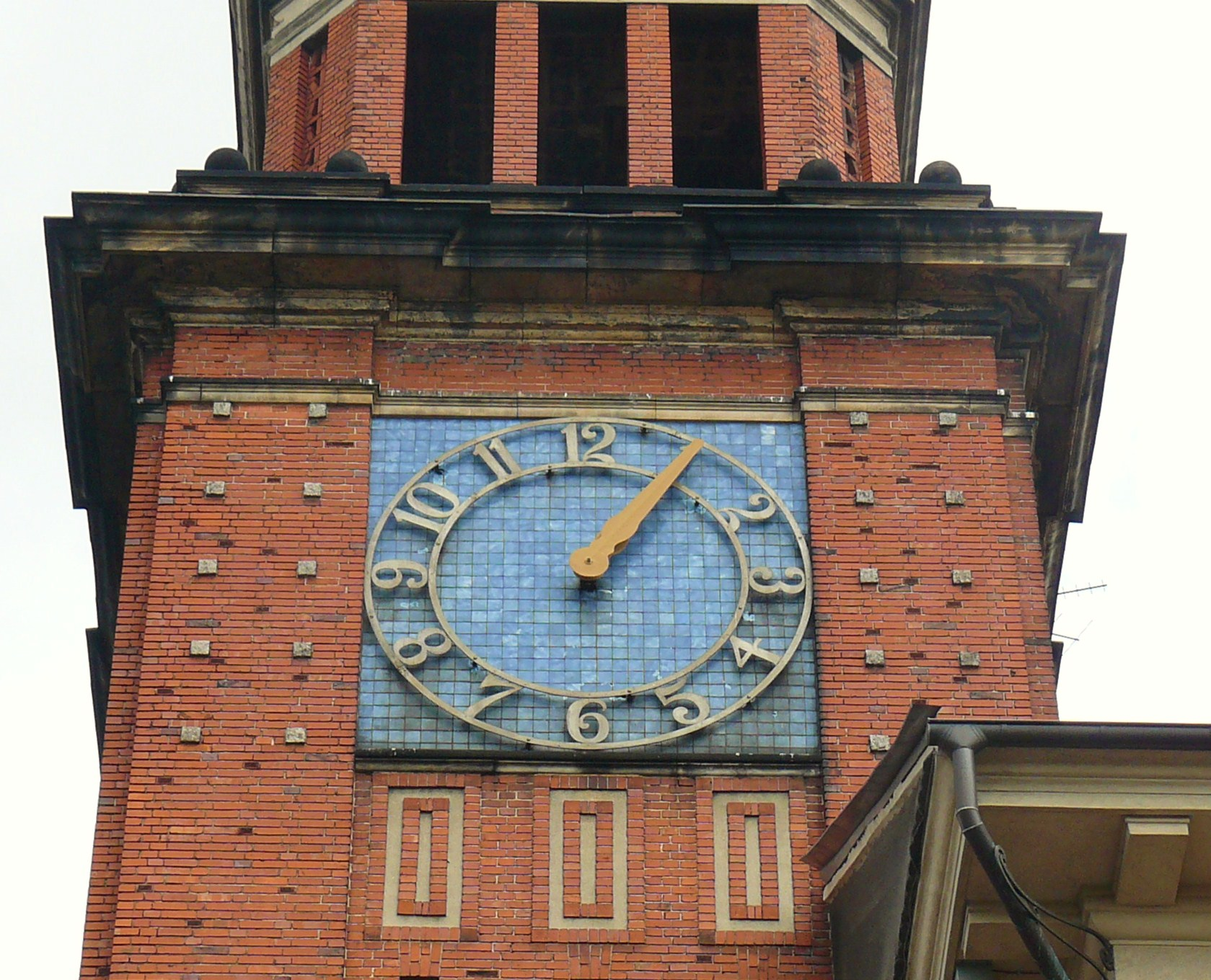 Poznań Jeżyce, ul. Słowackiego 54/60 - Szkoła Podstawowa nr 36 im. Henryka Sucharskiego, zespół zabudowań szkolnych